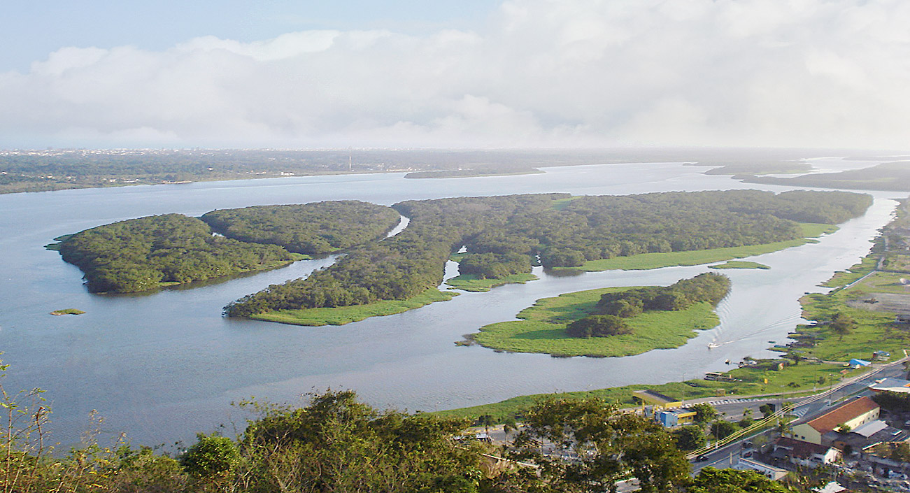 O lagamar compreende as cidades de Iguape, Ilha Comprida, Pariquera-Açu e Cananéia, no Estado de São Paulo, até chegar à cidade de Guaraqueçaba, no Paraná. São lagunas à beira-mar com vegetação de restingas e Mata Atlântica, quase que intocada e uma deslumbrante fauna e flora, além de incursões por sítios arqueológicos onde estão os sambaquis deixados por populações de mais de 5 mil anos